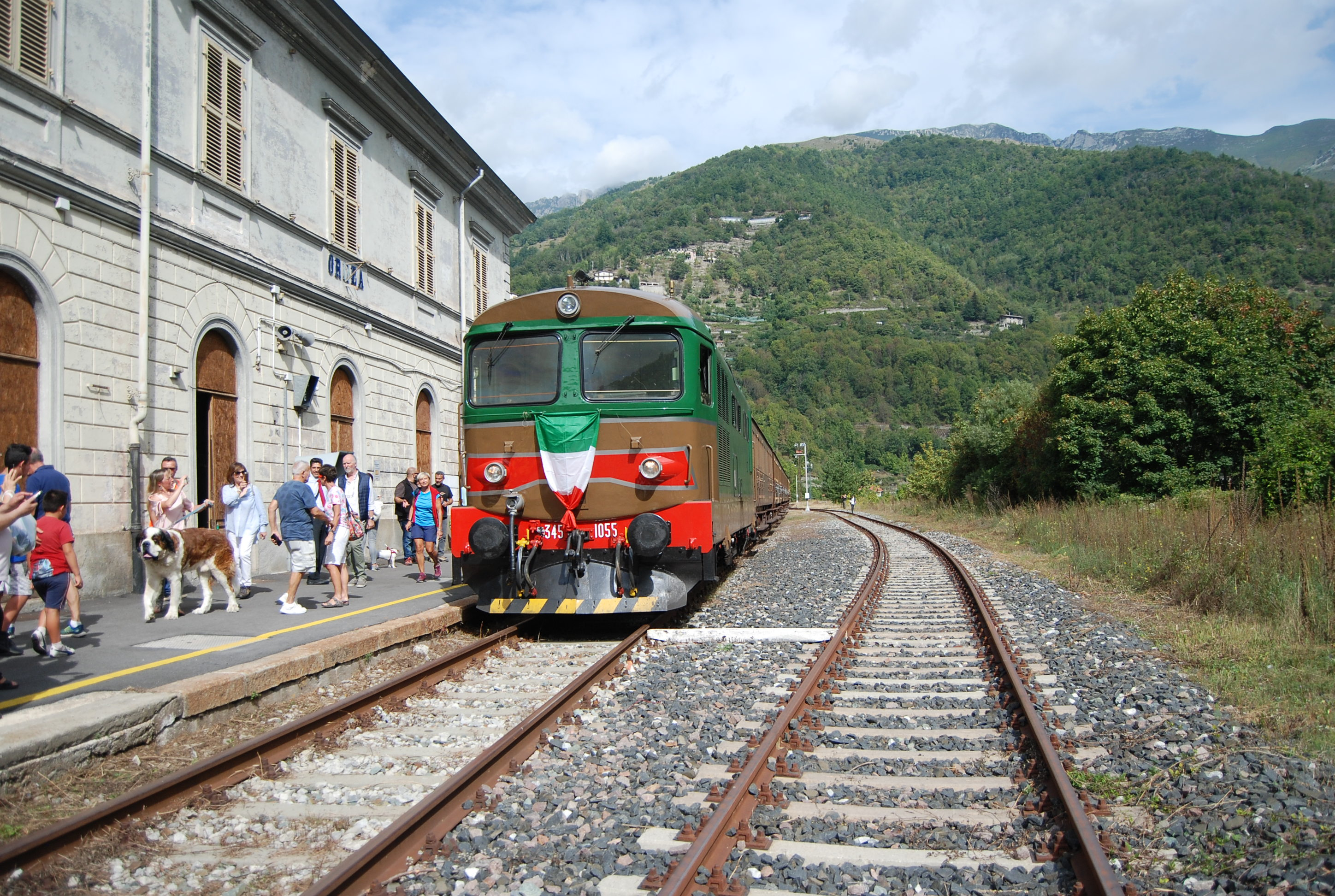 La D.345 1055 in testa a un treno turistico alla stazione di Ormea il 16 settembre 2018, composto da 5 carrozze Centoporte.